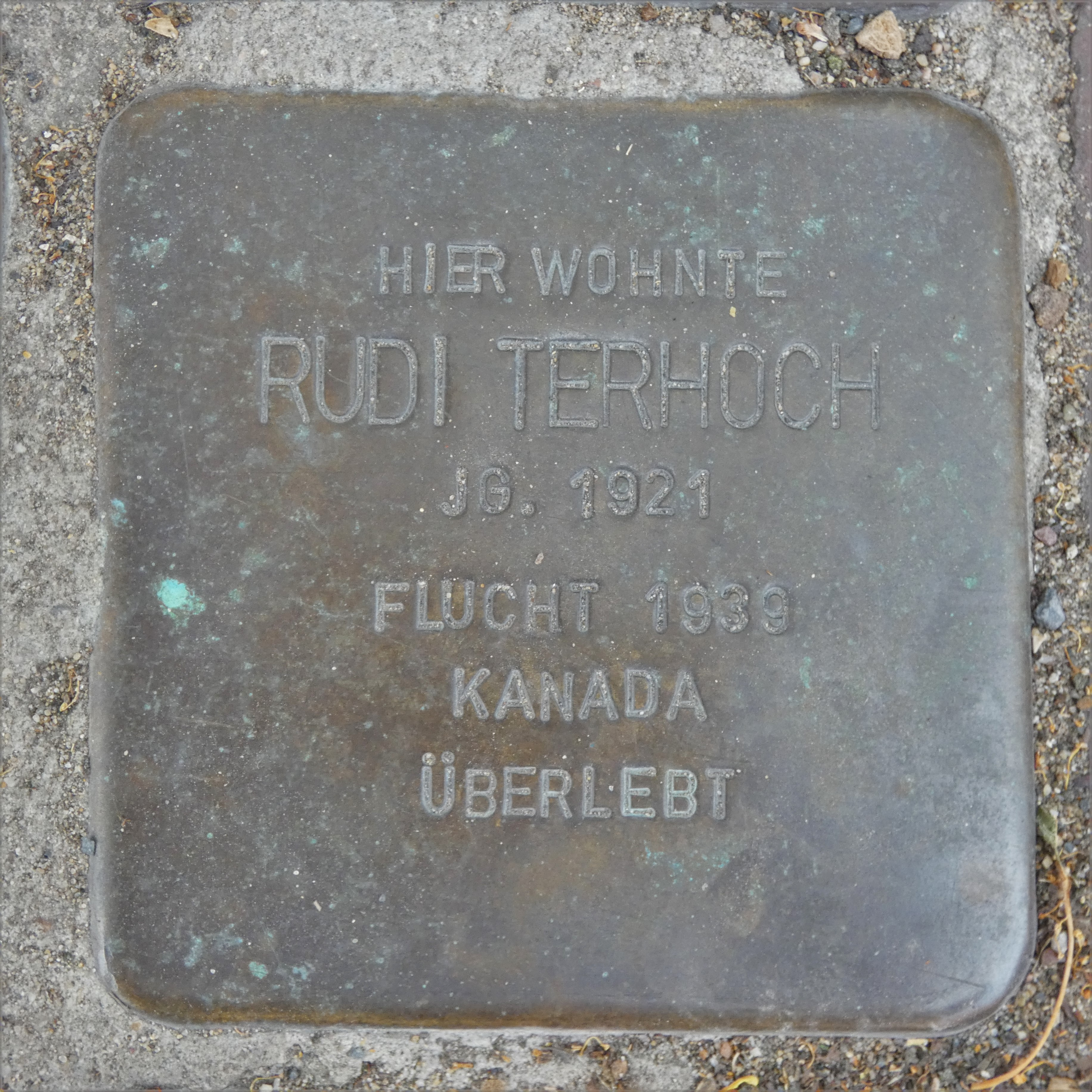 Hier wohnte Rudi Terhoch, Jg. 1921, Flucht 1939 Kanada, überlebt